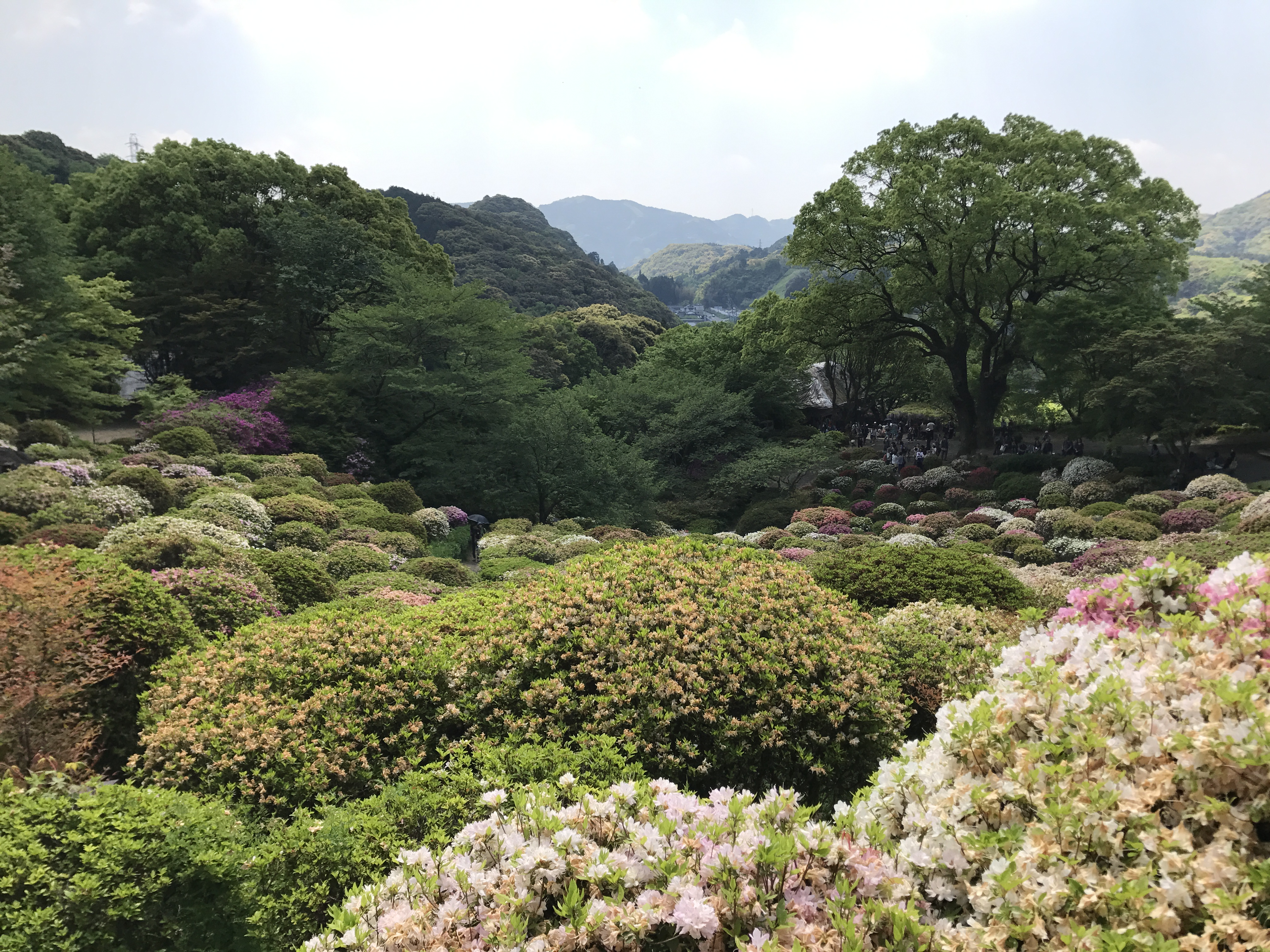 御船山楽園のツツジ谷